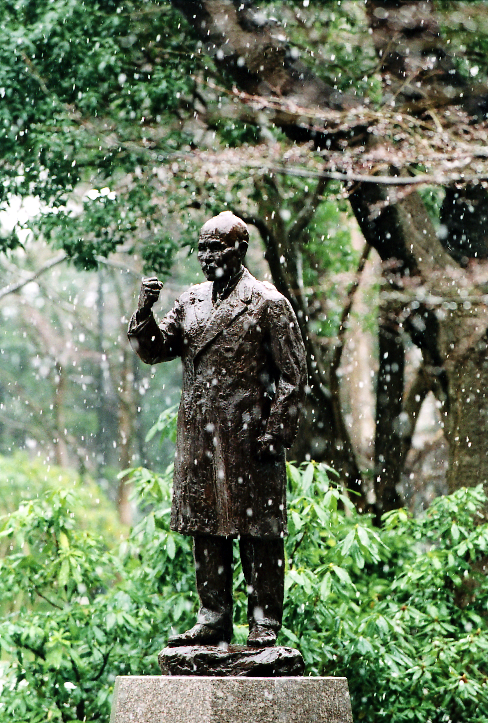 廣池学園で撮影